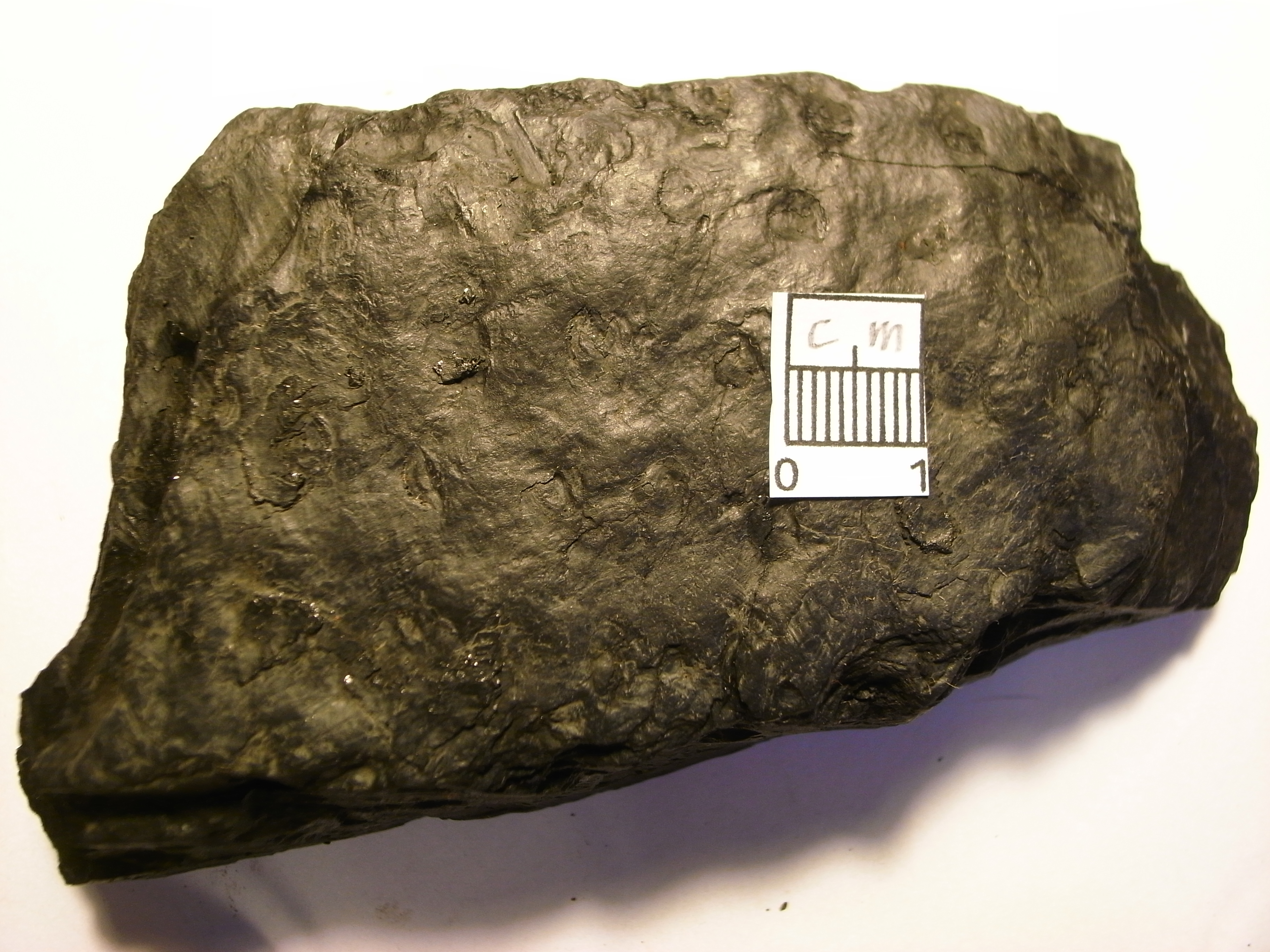 Fossilierte Pflanze in Tonschiefer, Fundort Abraum Zeche Pörtingsiepen